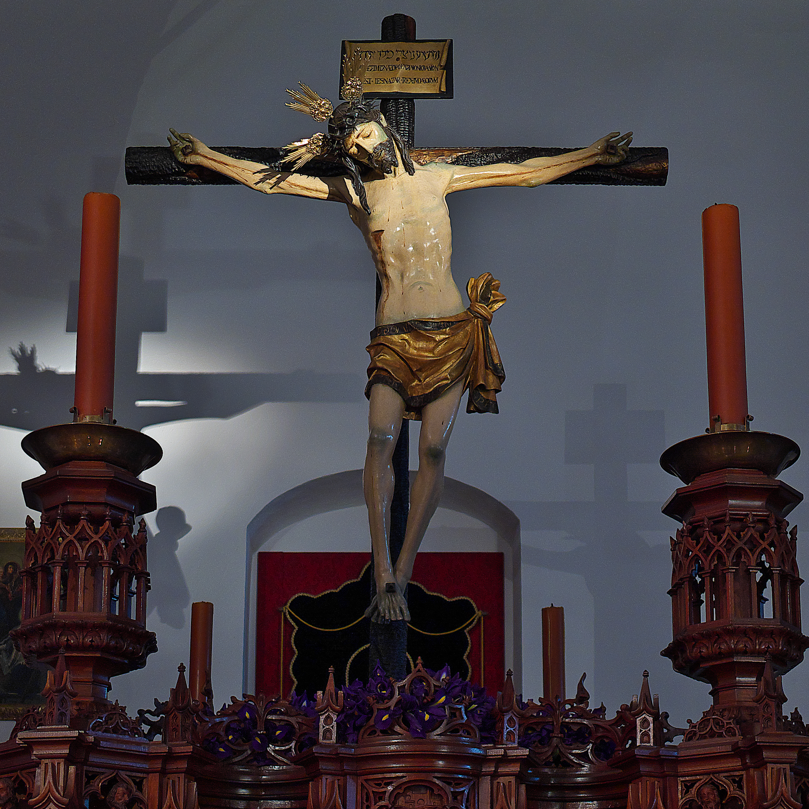 Imagen titular de la Hermandad del Santísimo Cristo de San Felipe, Cofradía de Nazarenos del Señor de la Amargura y María Santísima del Mayor Dolor. Iglesia de San Felipe, Carmona (Sevilla). Jorge Fernández Alemán (1521)